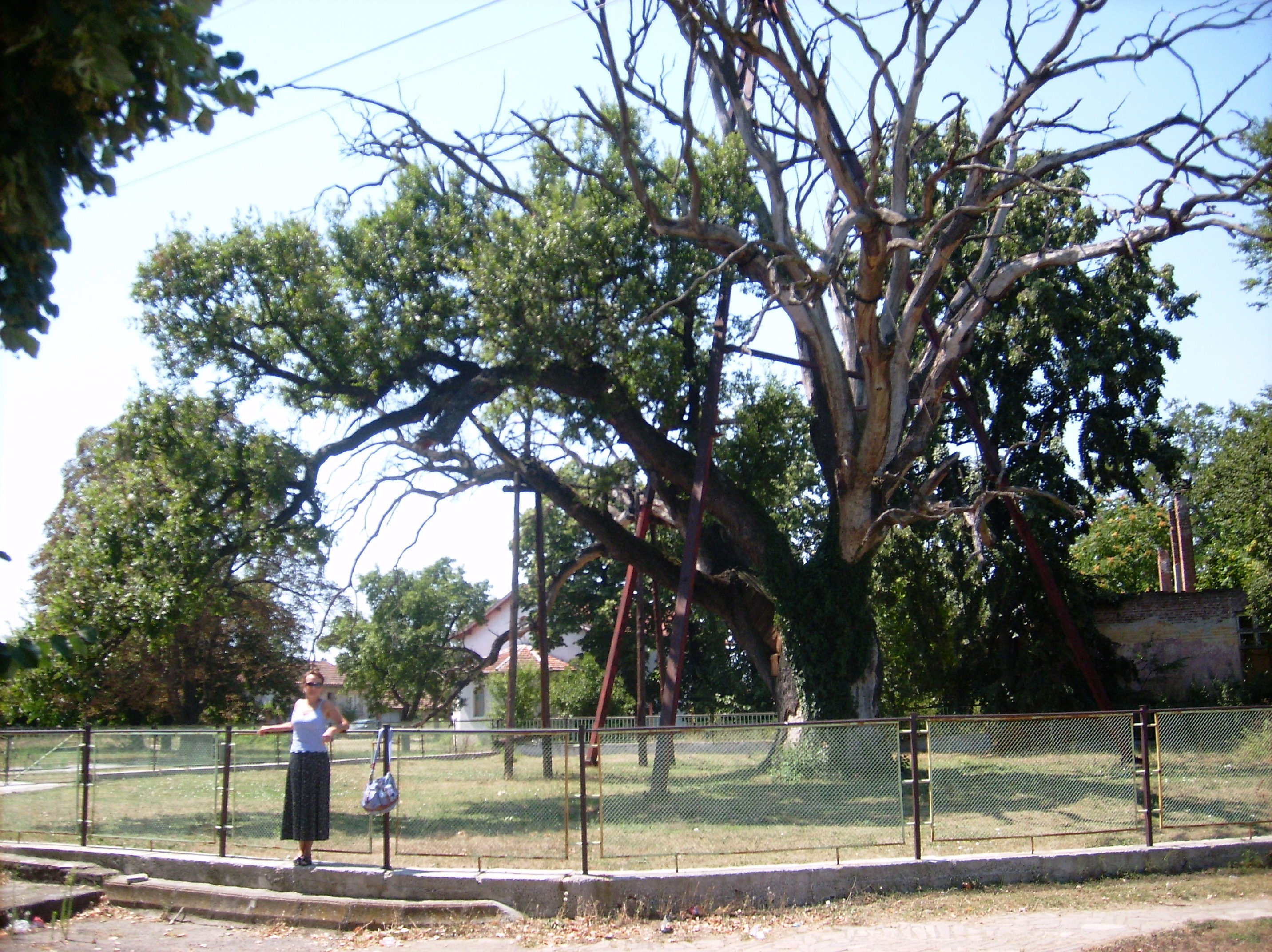 The Granit Oak